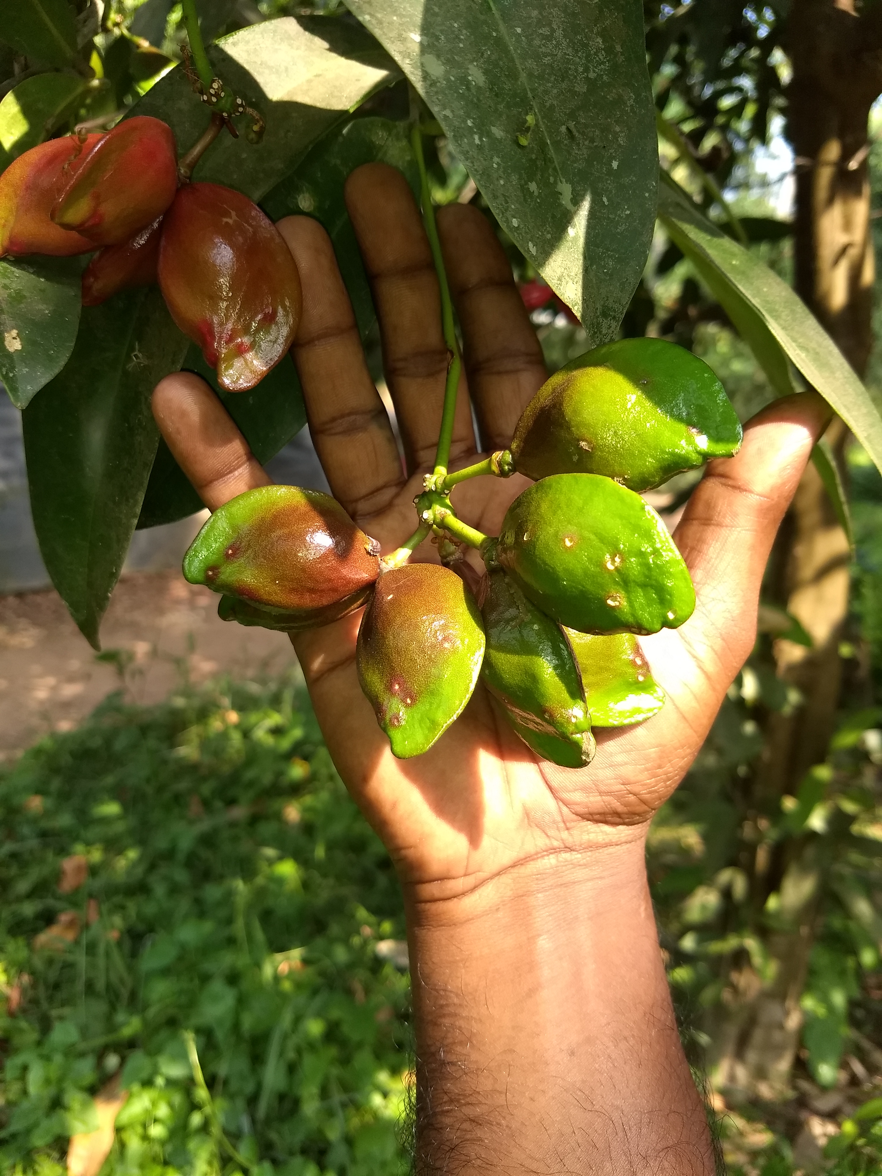 From Ezhupunna